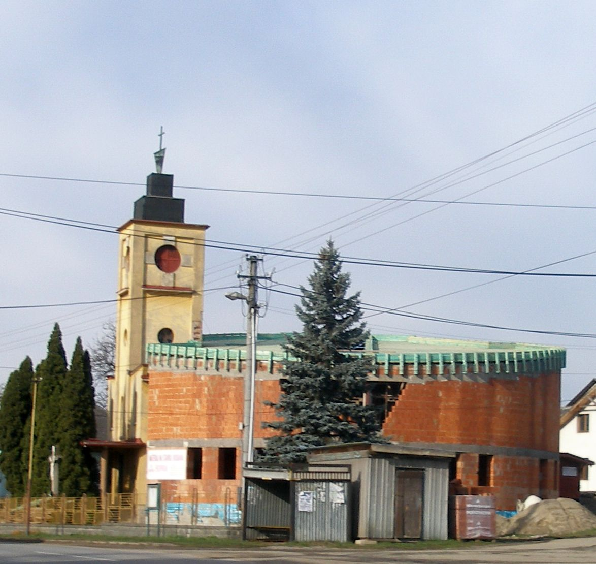 Obec Dulová Ves v okrese Prešov